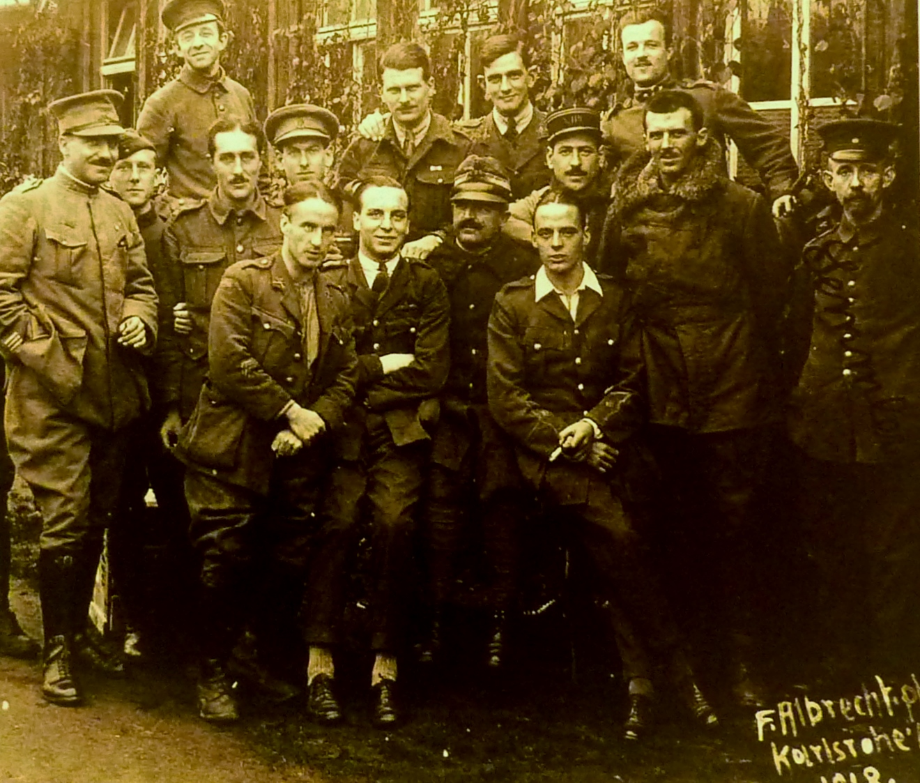 Prisonniers allemands dans un camp du Finistère, probablement l'Île-Longue, en 1919.